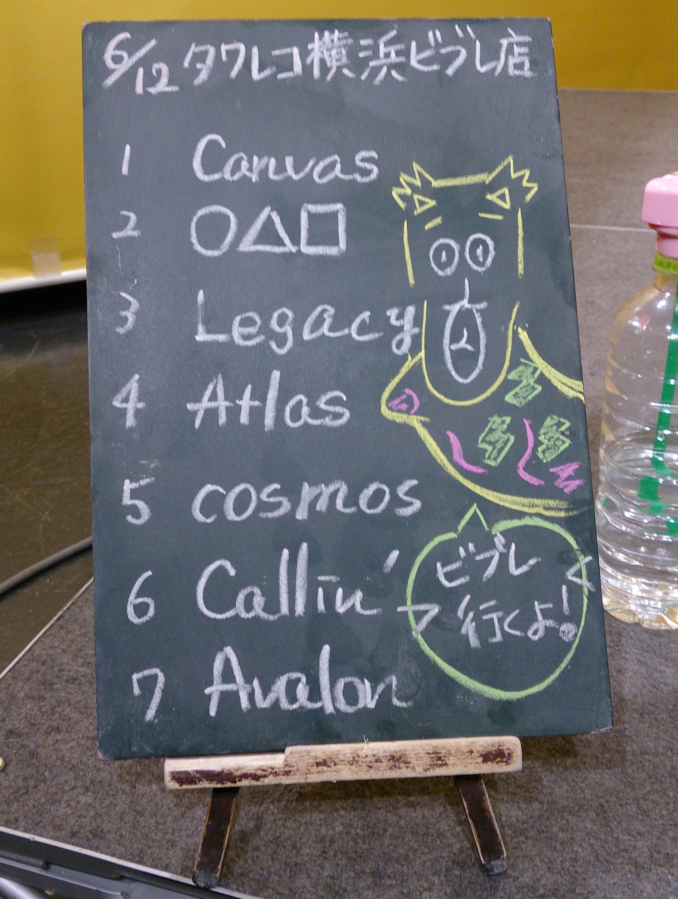 amiinAセトリボード(20170612(1))